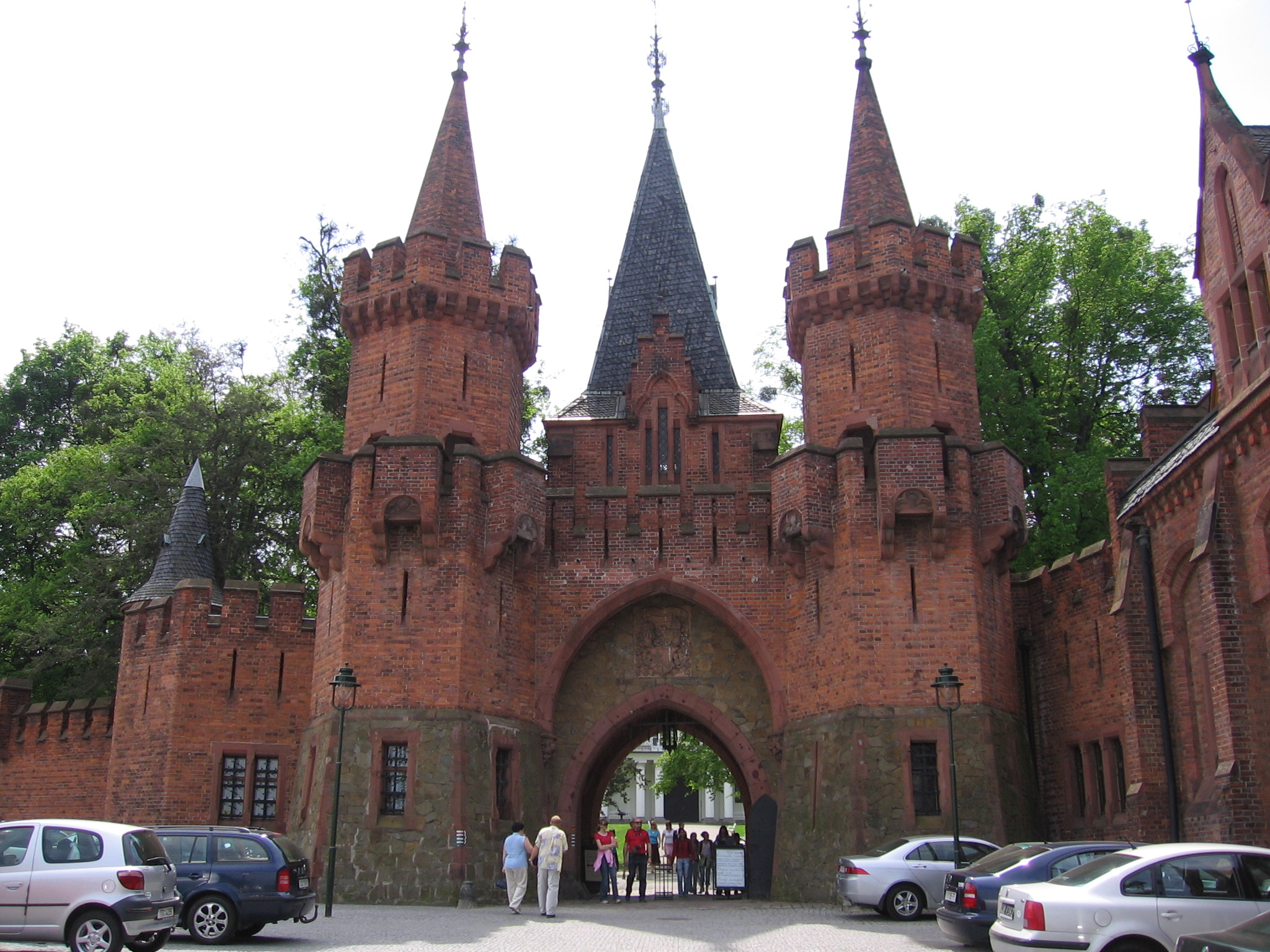 castle Hradec nad Moravicí, Czech Republic - entrance